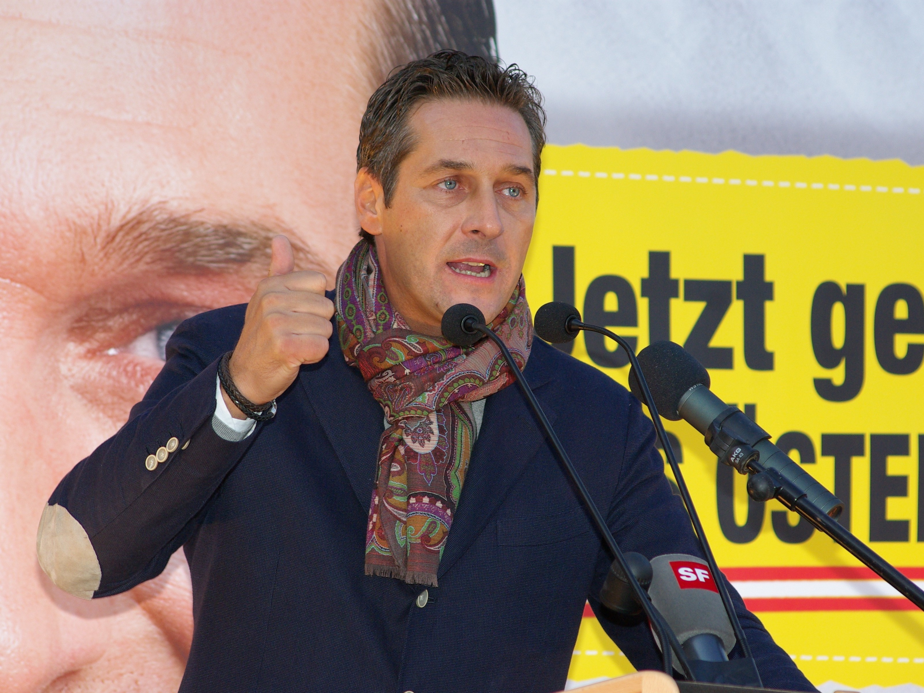 Der österreichische Politiker Heinz-Christian Strache bei einer Wahlkampfveranstaltung der FPÖ am 18. September 2008 in Sankt Pölten.